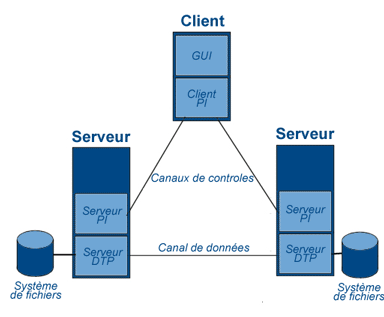 Ftp protocole